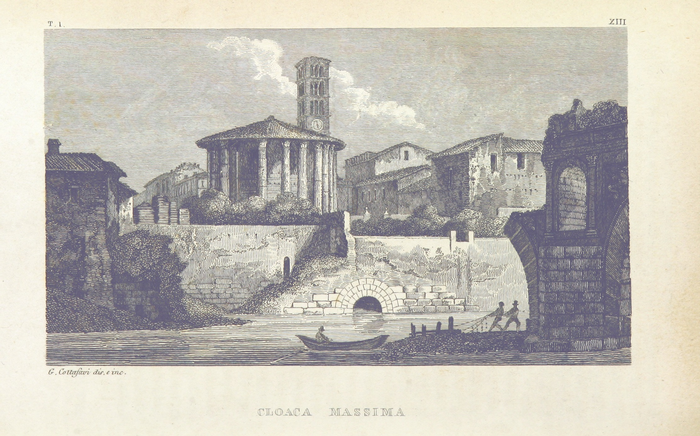 Image taken from: The British Library su Flickr Title: "Rome, ancient and modern, and its environs" Author: DONOVAN, Jeremiah - D.D., of Maynooth College Shelfmark: "British Library HMNTS 10130.dd.15." Volume: 04 Page: 308 Place of Publishing: Rome Date of Publishing: 1842 Issuance: monographic Identifier: 000967162 Nota: l'autore ha pubblicato l'immagine con “nessuna restrizione nota sul diritto d’autore”.